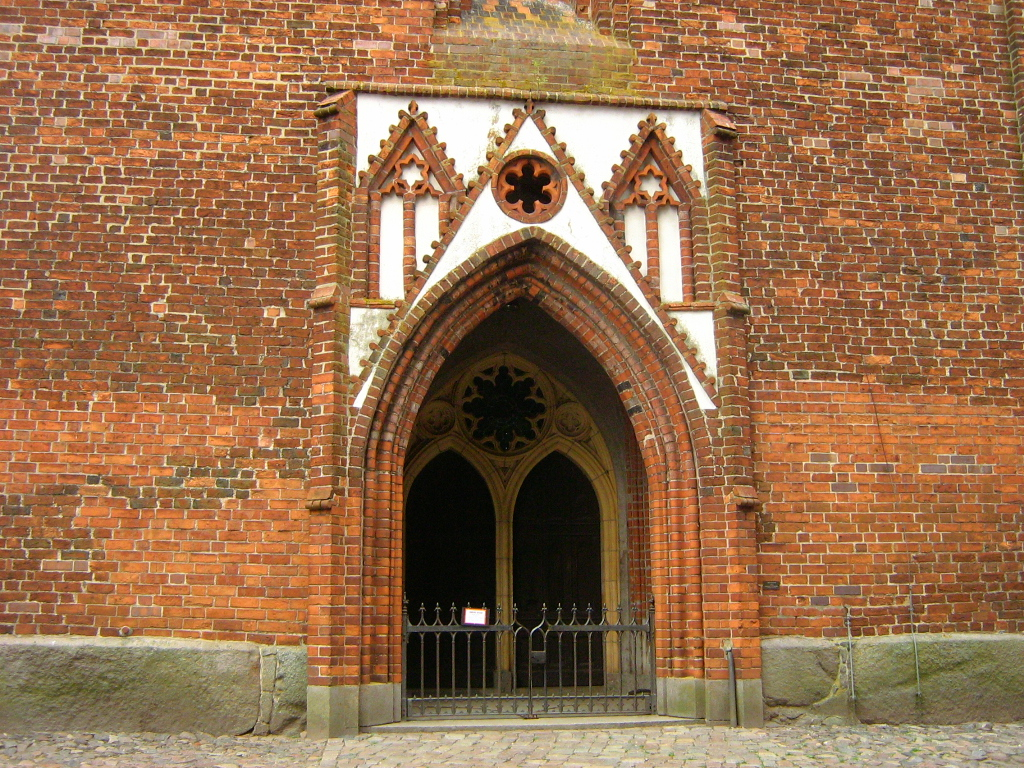 Westportal der St. Petri Kirche in Altentreptow, Landkreis Demmin, Mecklenburg-Vorpommern